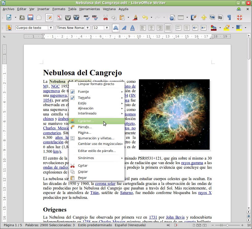 Pantalla de LibreOffice Writer 4.0.1.2 en Linux Mint 13